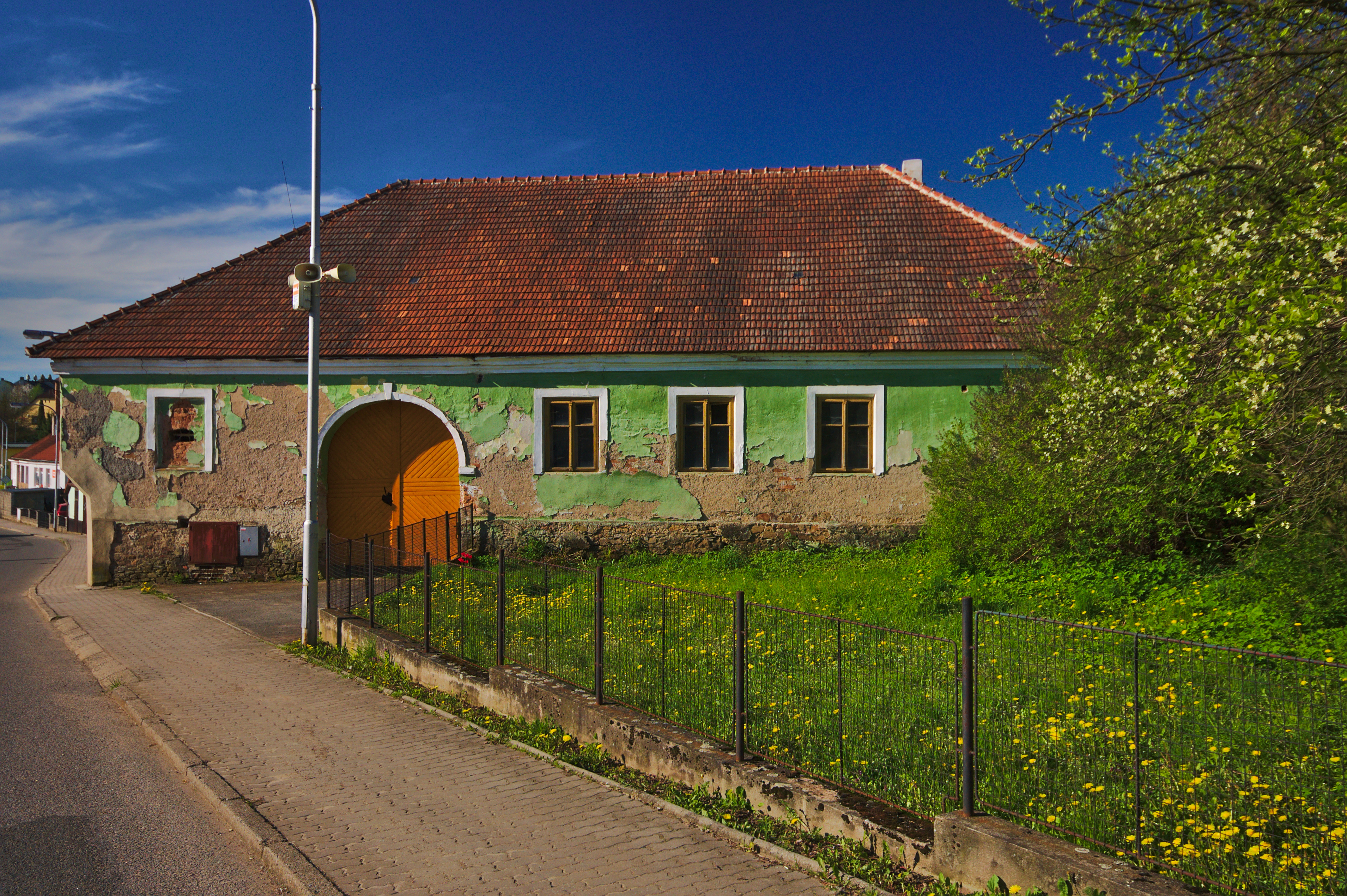 Bývalá hospoda, Lipová, okres Prostějov